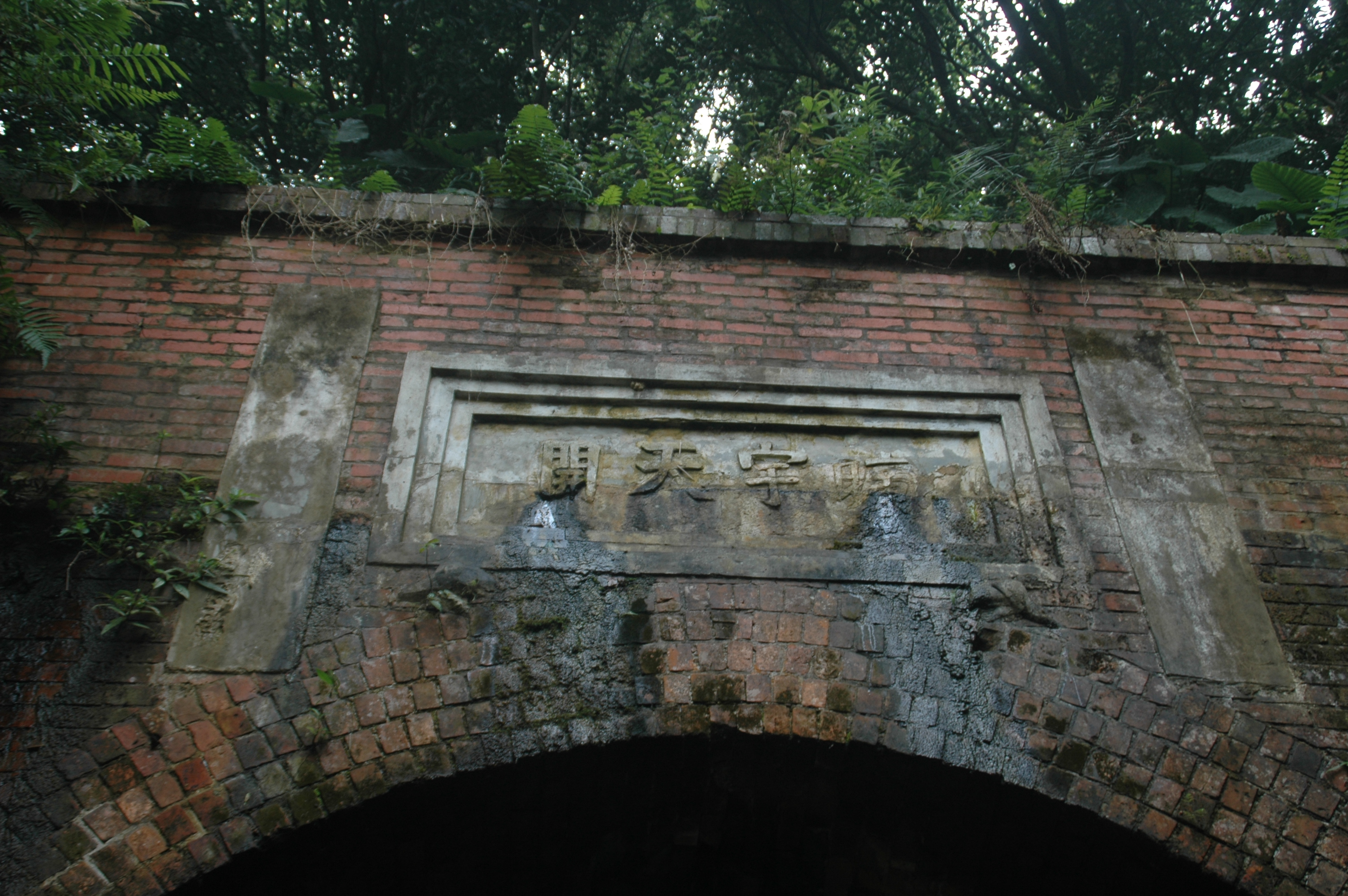 中文（台灣）: 基隆市古蹟1